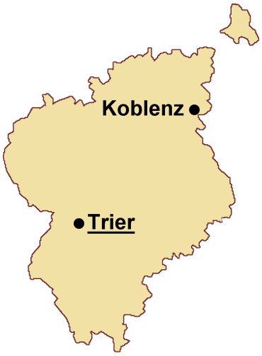 Karte des Bistums Trier, selbst erstellt, gemeinfrei